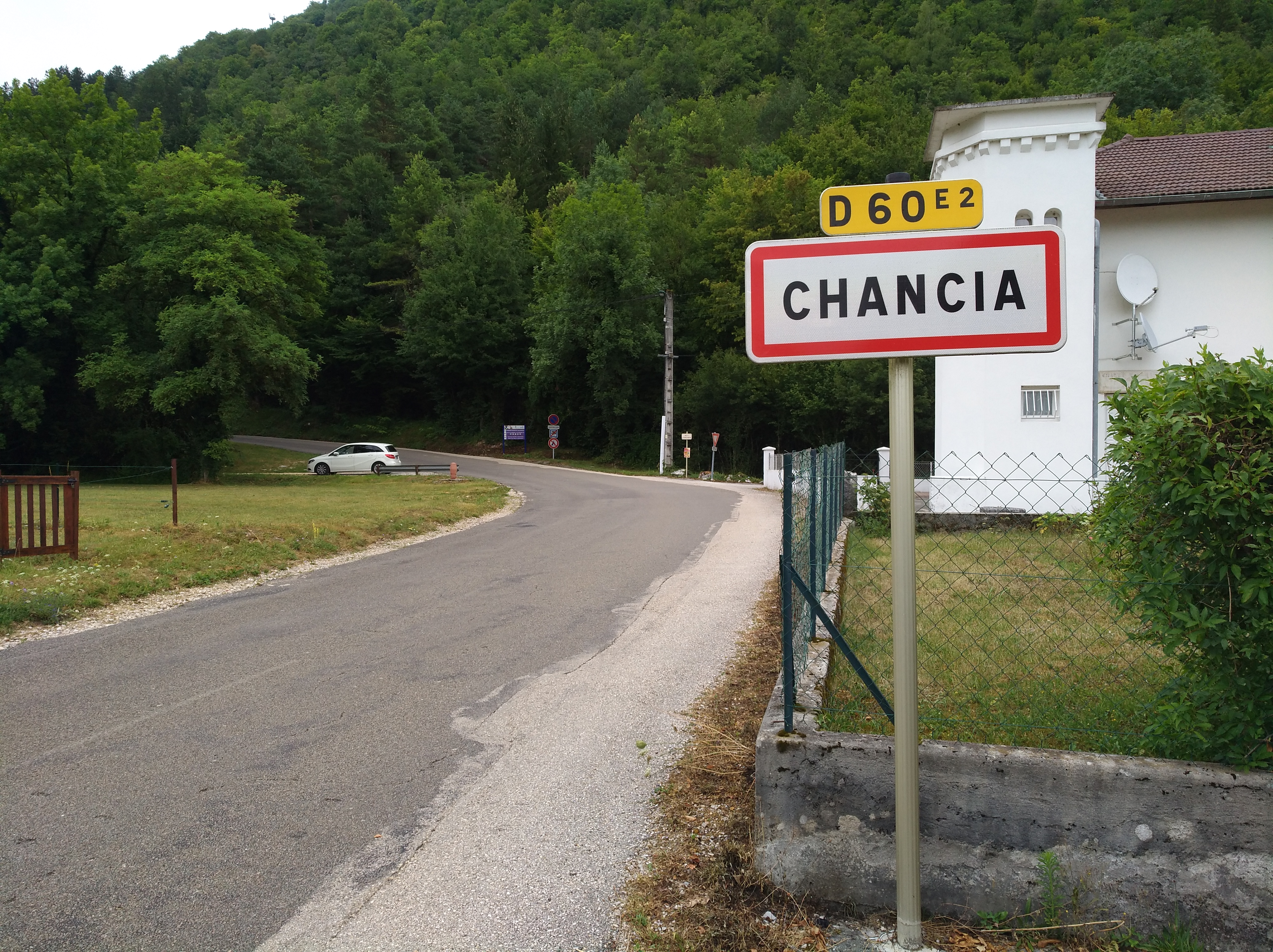 Panneau d'entrée dans Chancia (Jura, France).